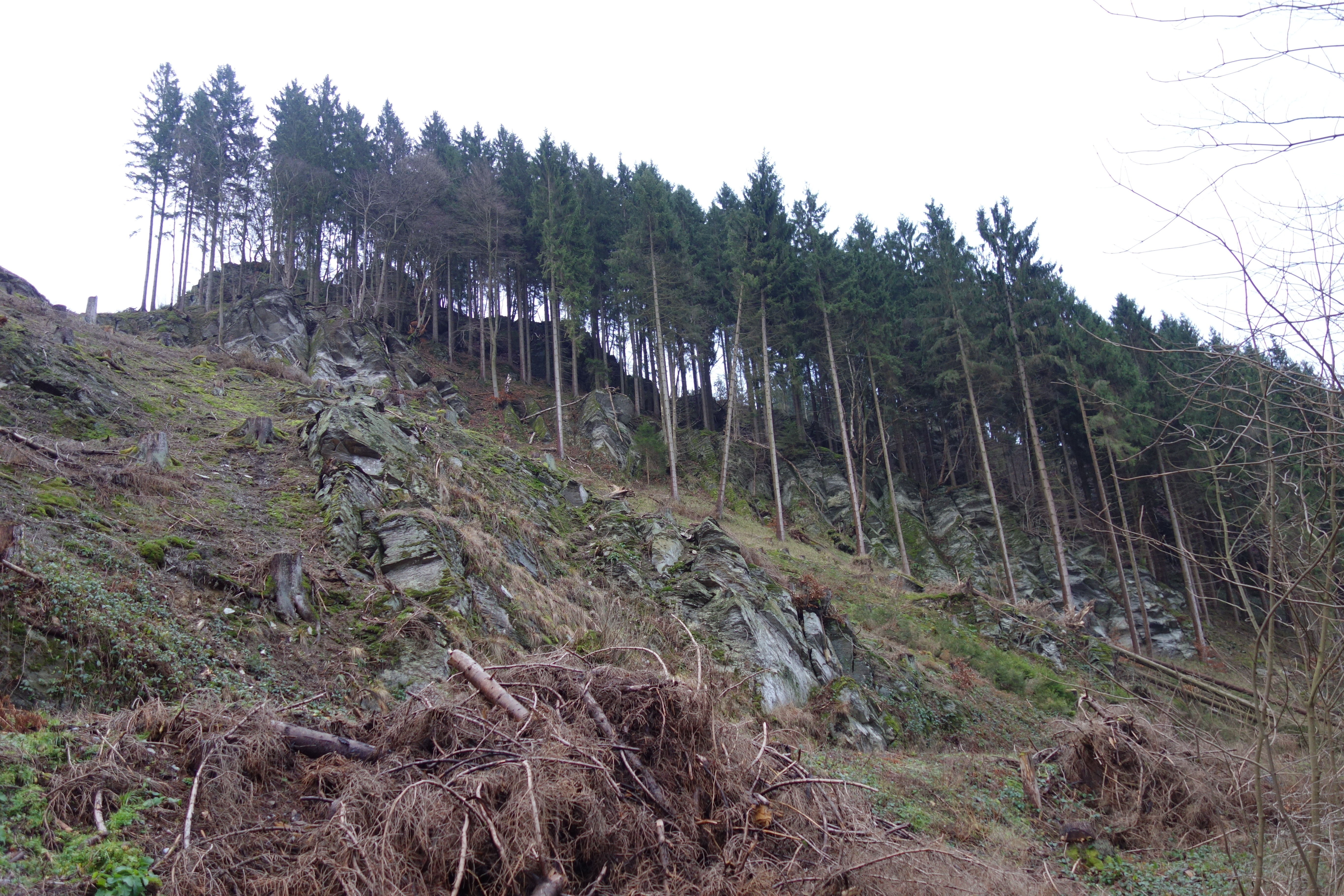 Naturdenkmal Hillerk-Felsen, große Hauptfläche von vier Teilflächen in Olsberg von Nordwesten (Waldweg an Neger).